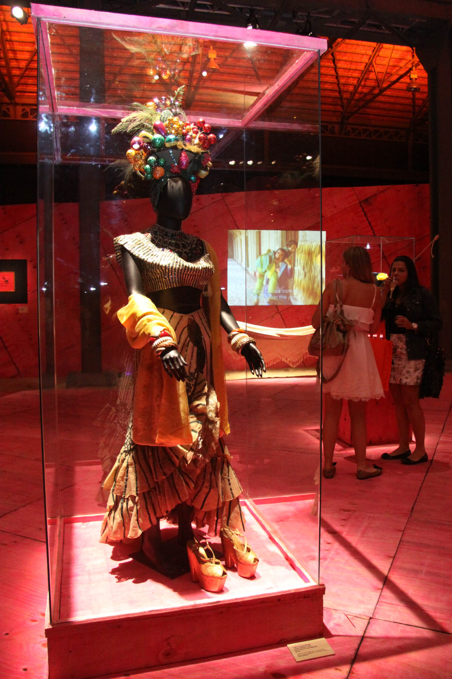 Exposição no Fashion Rio faz uma viagem pelos modos de se vestir no país, do século XIX aos dias de hoje. Carmem Miranda marca presença com a exuberância de seu vestuário.